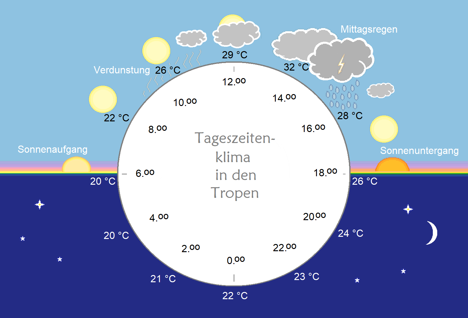 Tageszeitenklima: Tropentag